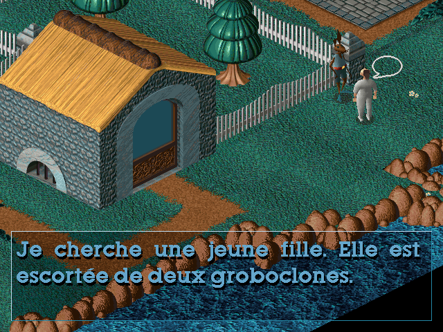 Capture d'écran du jeu vidéo Little Big Adventure (1994), développé par Adeline Software International.